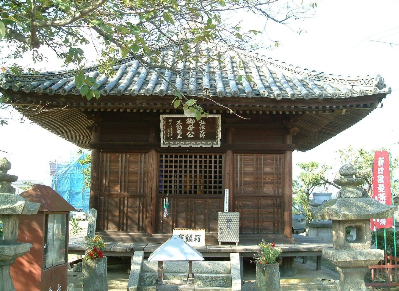 仏母院の御母公堂